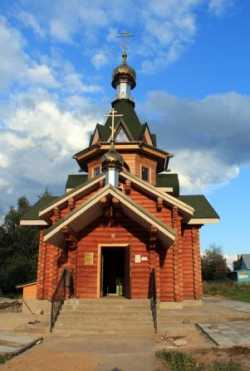 Церковь Петра и Февронии в селе Кузьминское Рыбновского района Рязанской области